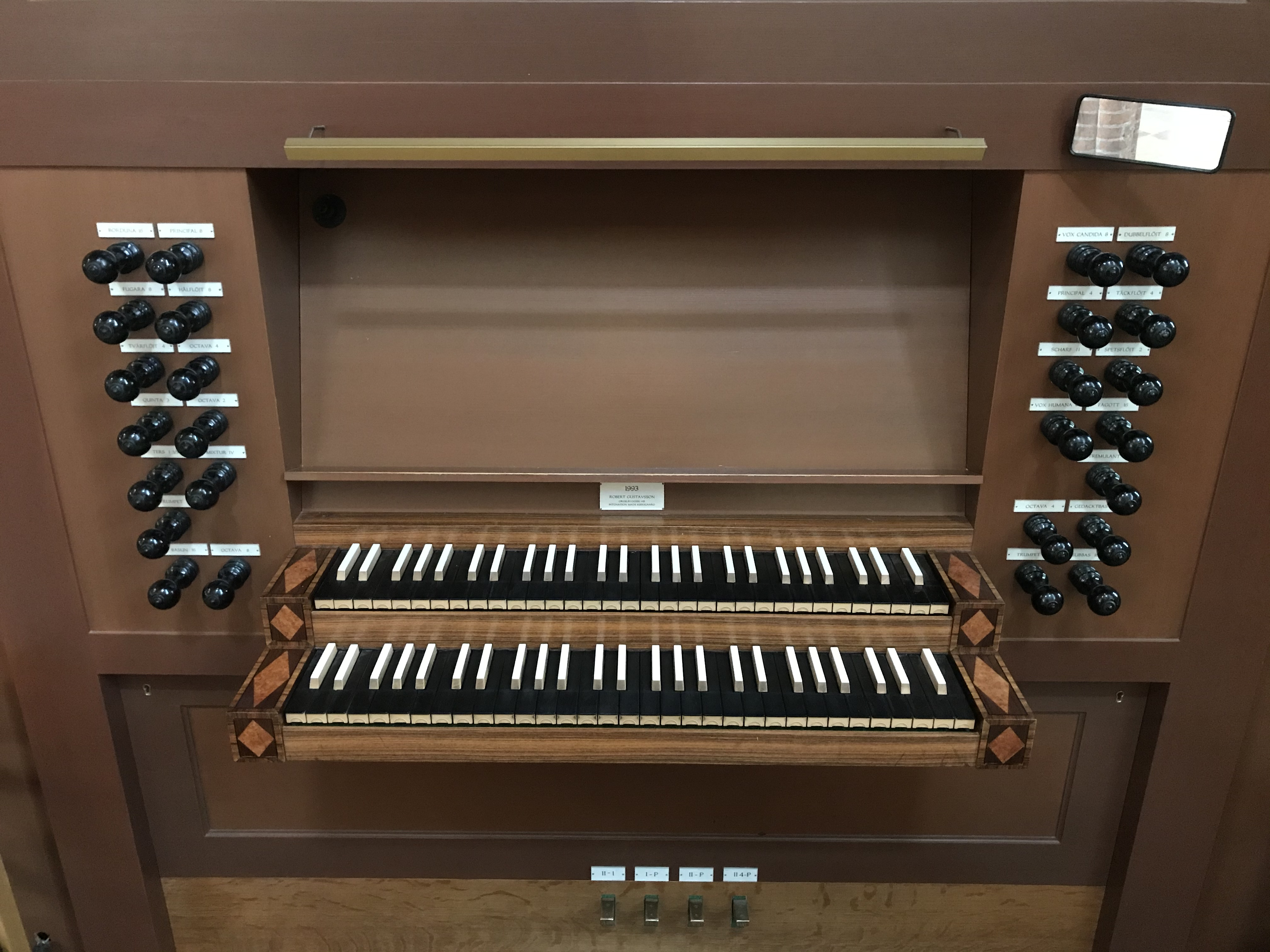 Spelbordet vid Helga Trefaldighets kyrkas orgel byggd av Robert Gustavsson orgelbyggeri AB 1993